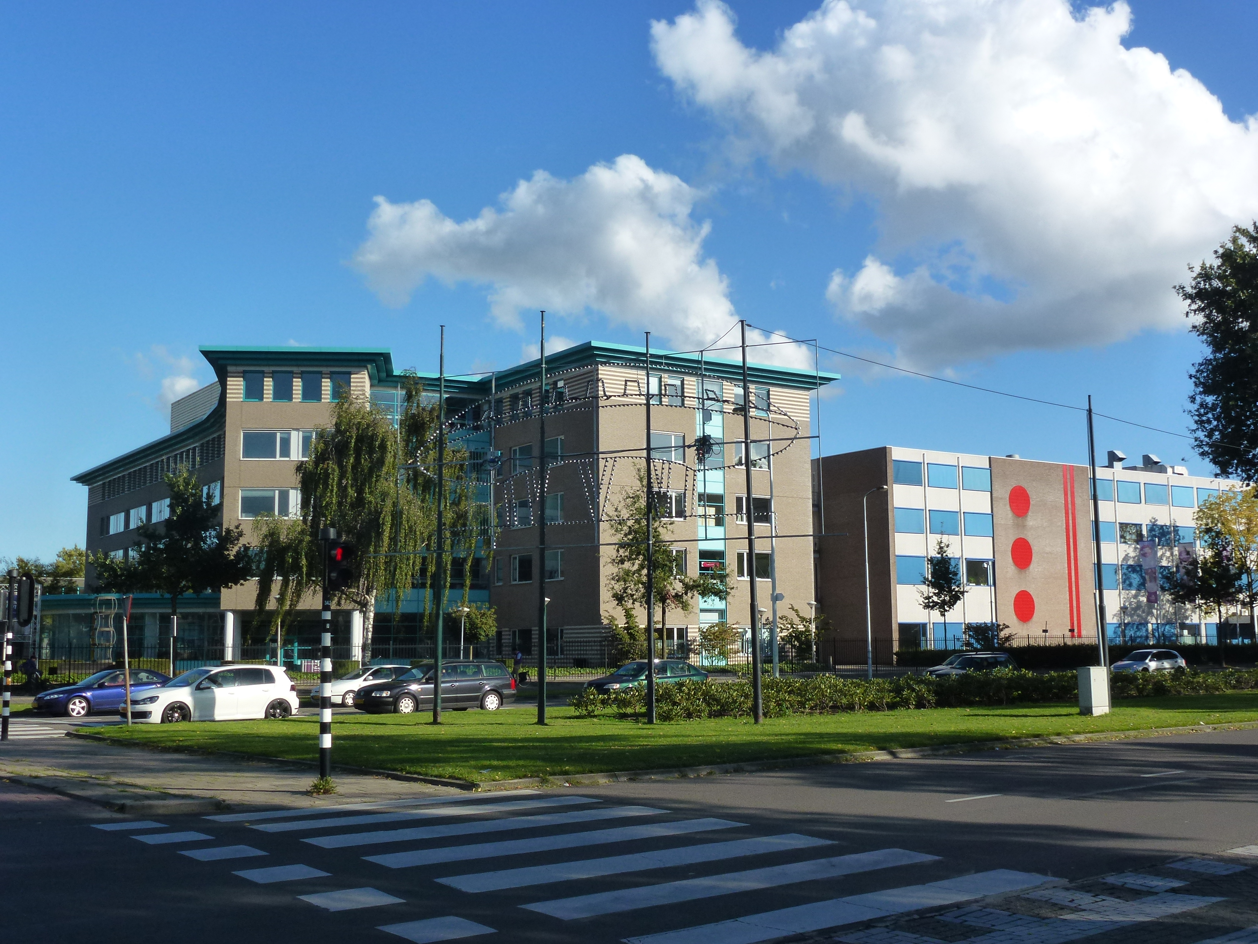 Fontys Rachelsmolen Eindhoven